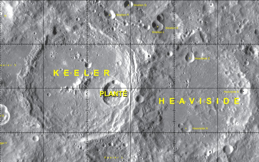 Cráter lunar Planté. Localización. (Imagen LRO)